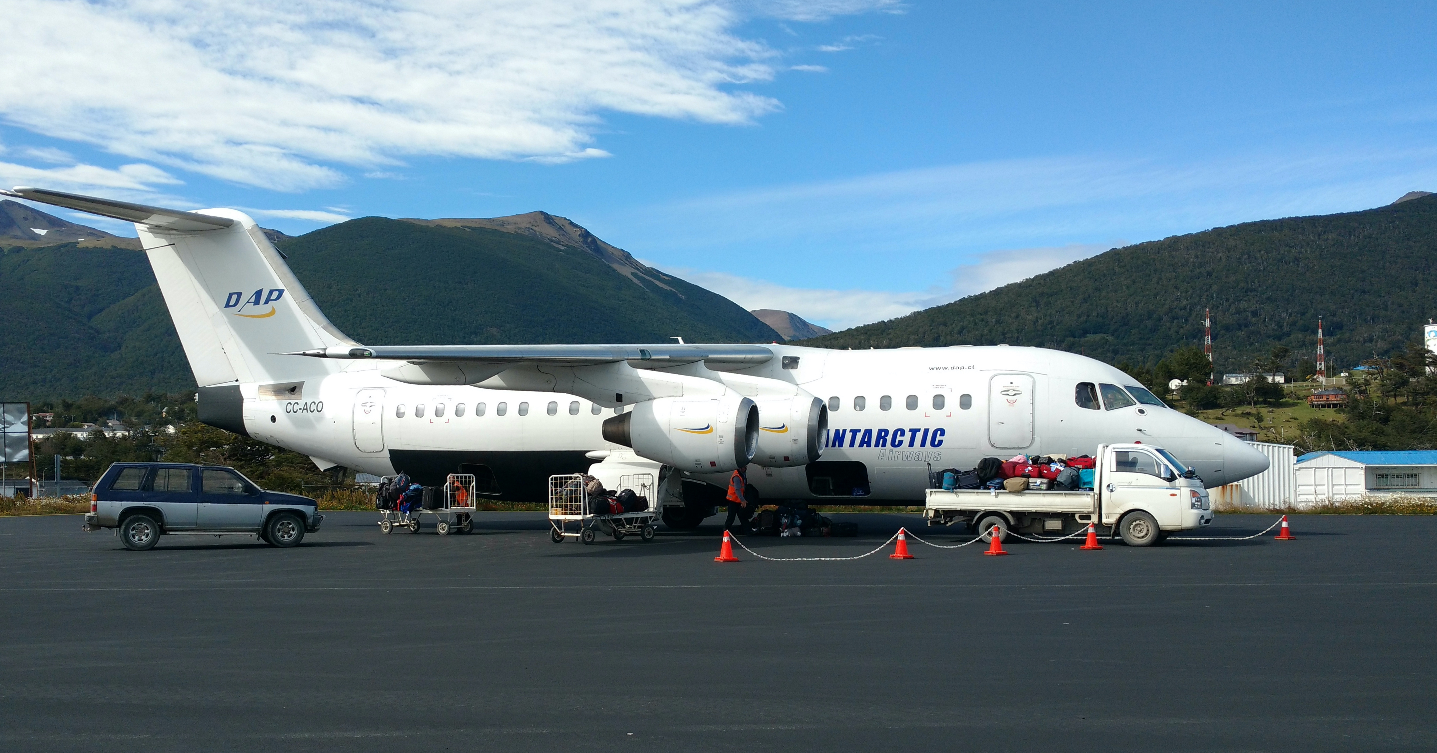 BAe 146 de Aerovías DAP aterrizando en el Aeródromo Guardiamarina Zañartu de Puerto Williams, Chile.